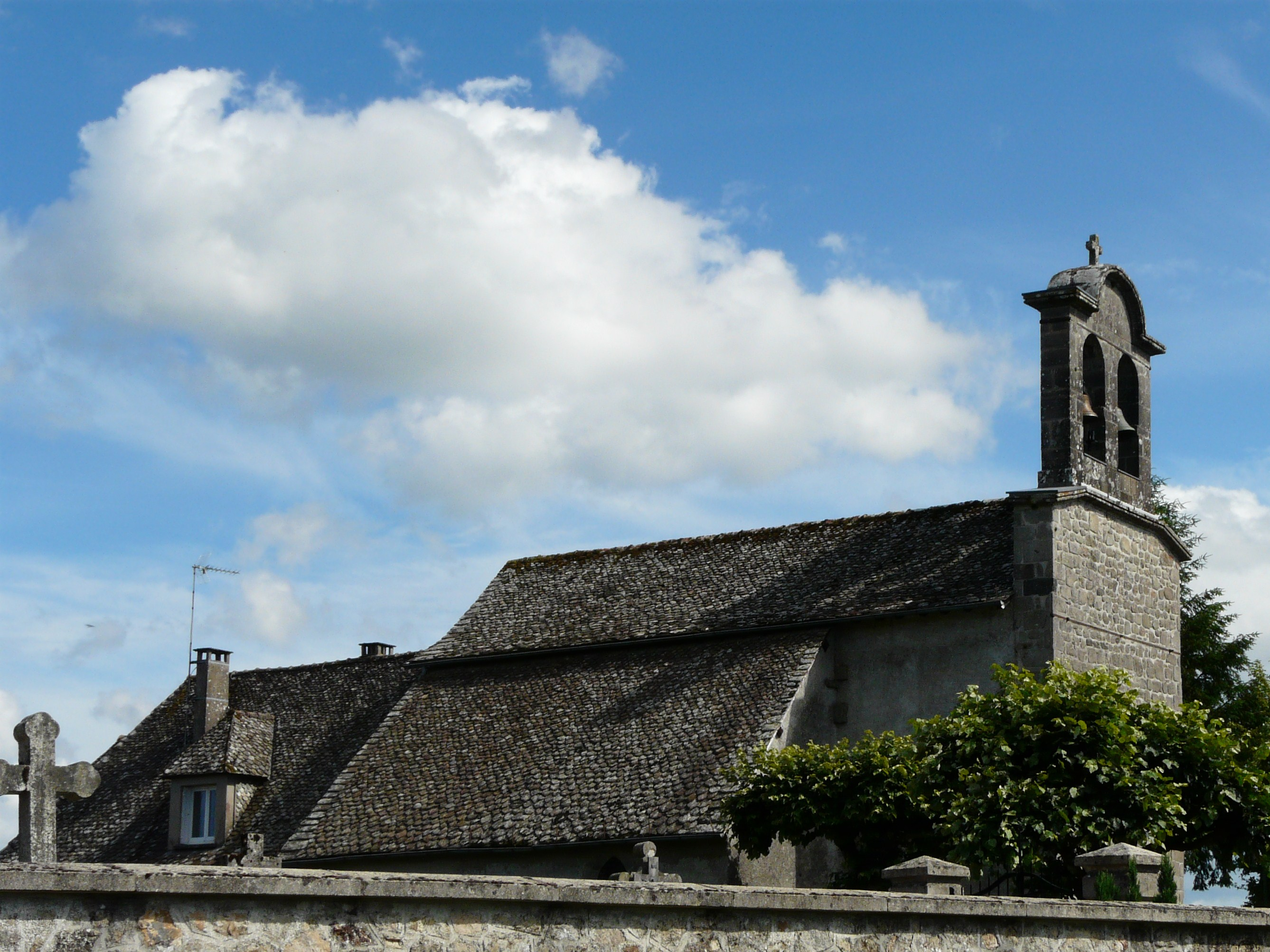 L'église Saint-Étienne de Saint-Étienne-Cantalès, Cantal, France.